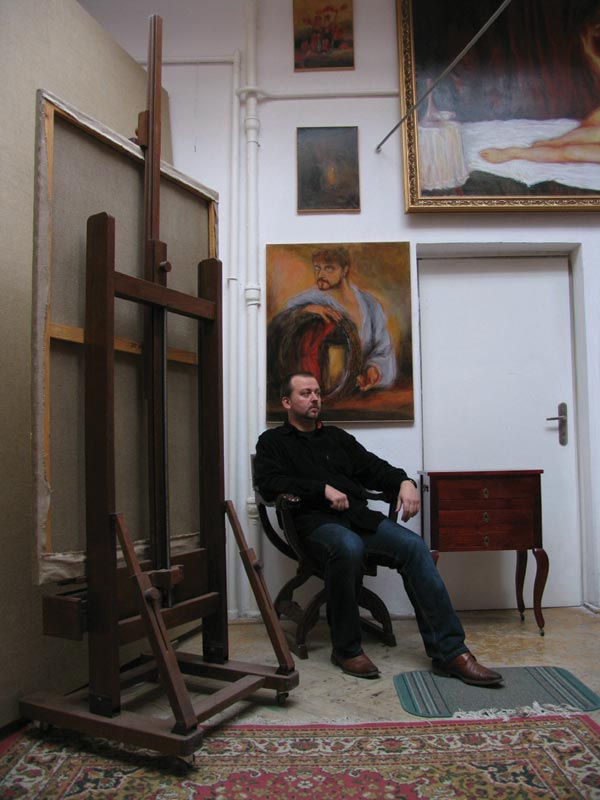 malarz Janusz Janowski w swojej pracowni w Gdańsku